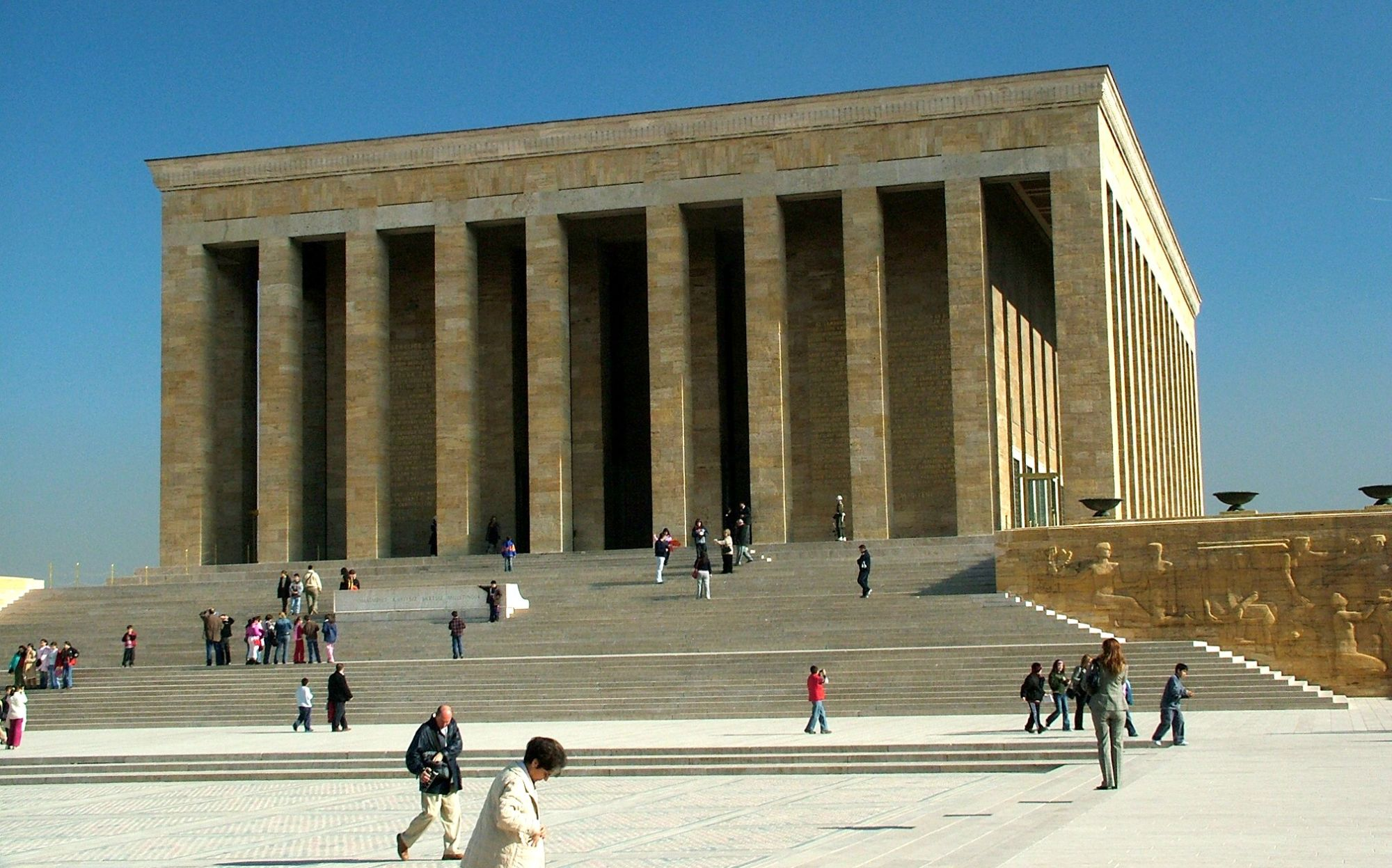 Ankara, Anitkabir, Atatürk Mauzóleum (Törökország). A mauzóleum díszlépcsős homlokzati pillérsora.